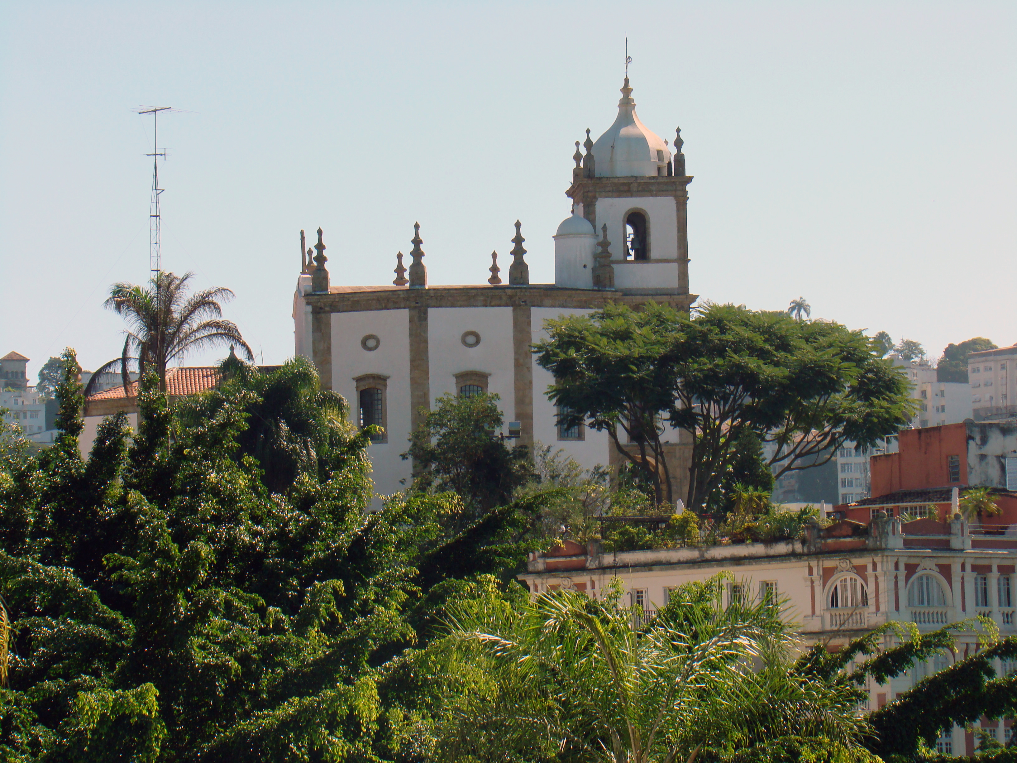 Igreja de Nossa Senhora da Gl�ria do Outeiro A Igreja de Nossa Senhora da Gl�ria do Outeiro, mais conhecida simplesmente como Igreja da Gl�ria, ergue-se no alto do outeiro da Gl�ria, no bairro de mesmo nome, na cidade do Rio de Janeiro. � considerada uma das j�ias da arquitetura colonial brasileira e um dos mais caracter�sticos monumentos do Rio. Dada a sua localiza��o elevada � facilmente vis�vel do Aterro do Flamengo e arredores.